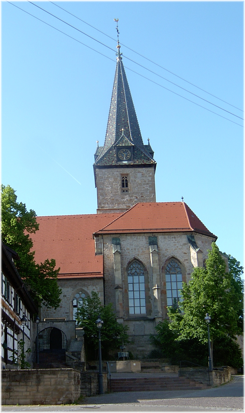 Martinskirche oder Alte Dorfkirche Kornwestheim